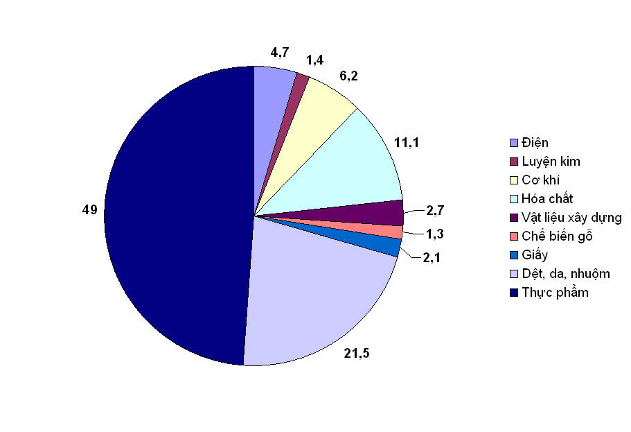 Tỷ trọng của các phân ngành công nghiệp trong tổng giá trị sản lượng công nghiệp của Việt Nam Cộng Hòa năm 1973.Dựa theo số liệu của Bộ Kinh tế (dẫn lại từ Đặng Phong (2004), Kinh tế Miền Nam Việt nam thời kỳ 1955 - 1975, Nhà xuất bản Khoa học xã hội, Hà Nội, tháng 12, Bảng 6.7, trang 295.